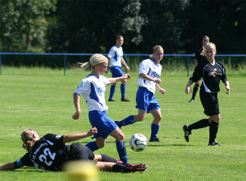 ASV Hagsfeld - SC Regensburg 02